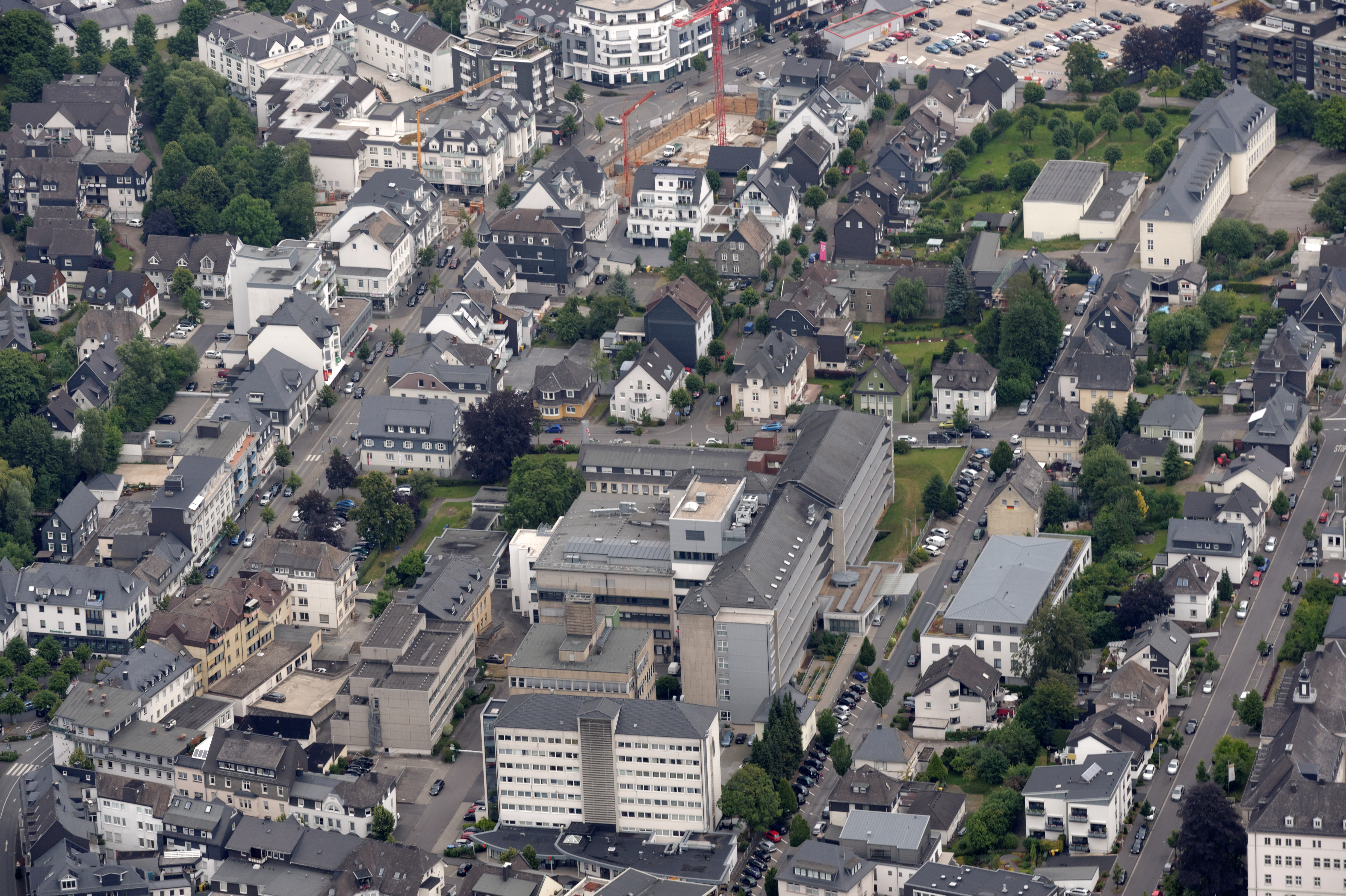 Fotoflug Sauerland Nord. Olpe, St.-Martinus-Krankenhaus, Blickrichtung Nordost The making of this document was supported by the Community-Budget of Wikimedia Germany.